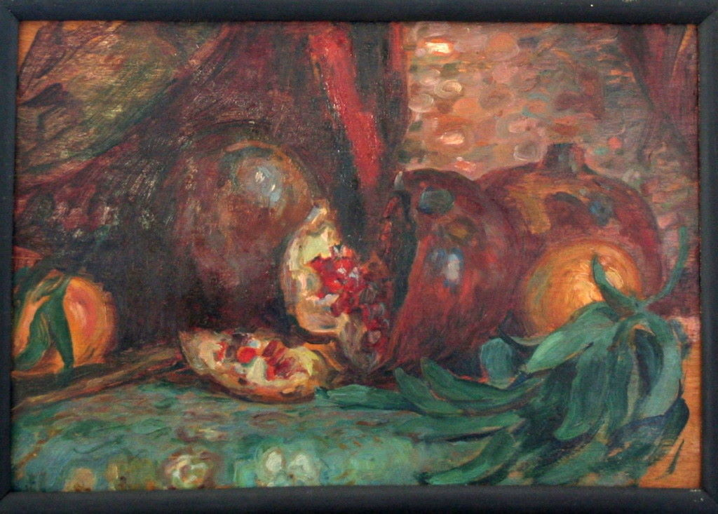 Faite lors de son premier voyage en Italie